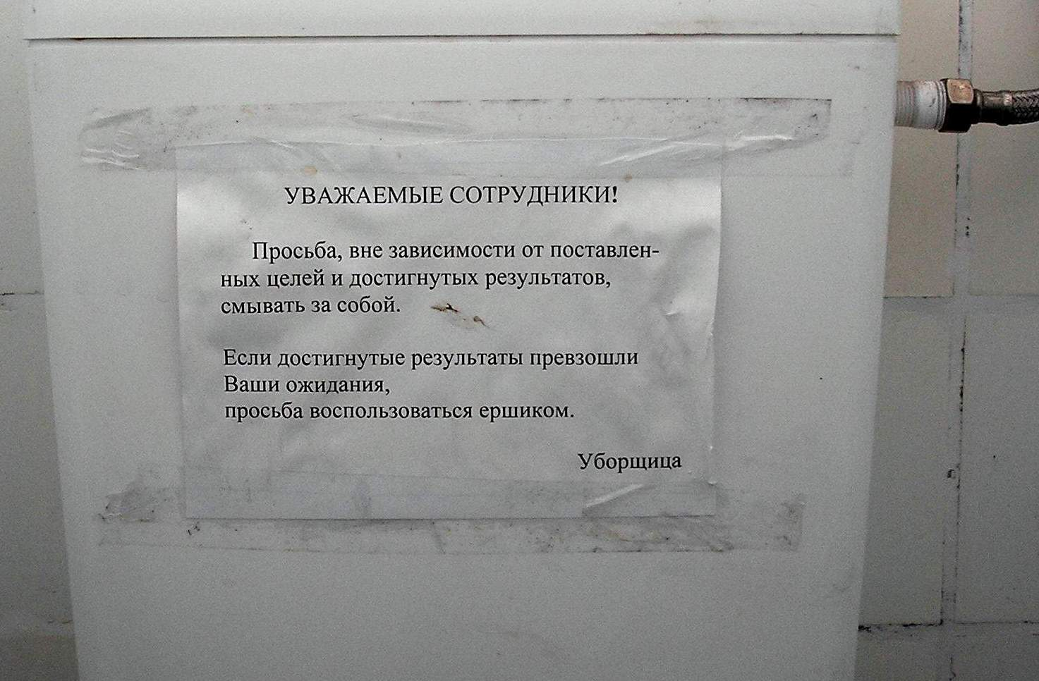 Объявление в туалете одного из научно-исследовательских институтов (НИИ) Харькова. Об'ява у туалеті одного із наукових інститутів м. Харкова.